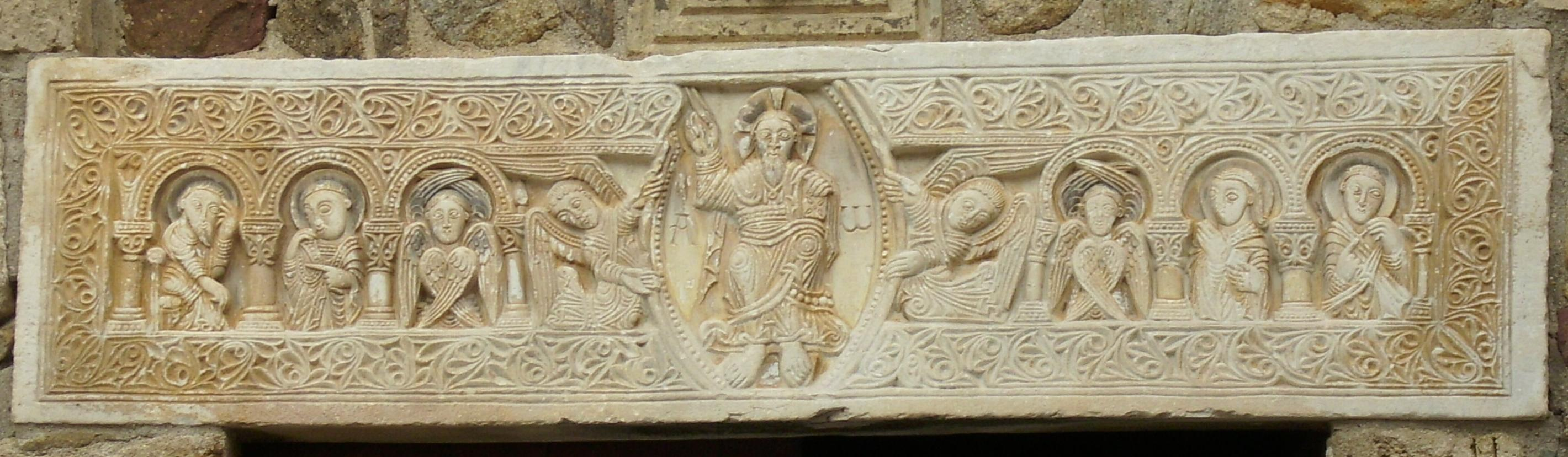 Linteau de l'église de Saint André de Sorède (66). On peut y voir, au centre, le Christ ressuscité (avec une auréole contenant une croix) entouré d'une mandorle dans laquelle se trouvent l'alpha et l'oméga. De chaque côté du Christ se trouvent deux Séraphins (anges à 3 paires d'ailes) ainsi que deux personnages (quatre en tout) dont l'idendité reste inconnue (peut-etre les Evangélistes ou des Apôtres). Ce linteau est en marbre blanc et les personnages est entourée d'une fresque aux motifs orientaux. On suppose qu'à l'origine, ce linteau faisait partie de l'autel.